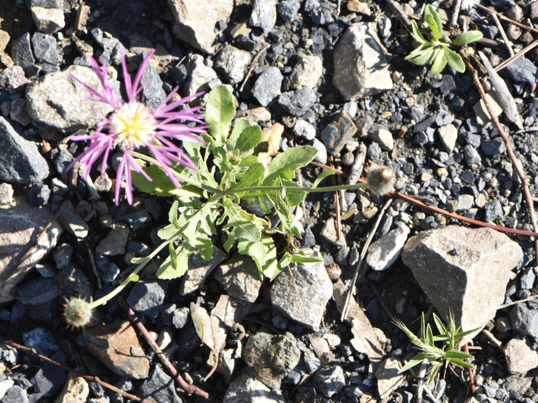 Volutaria muricata - Vista general.